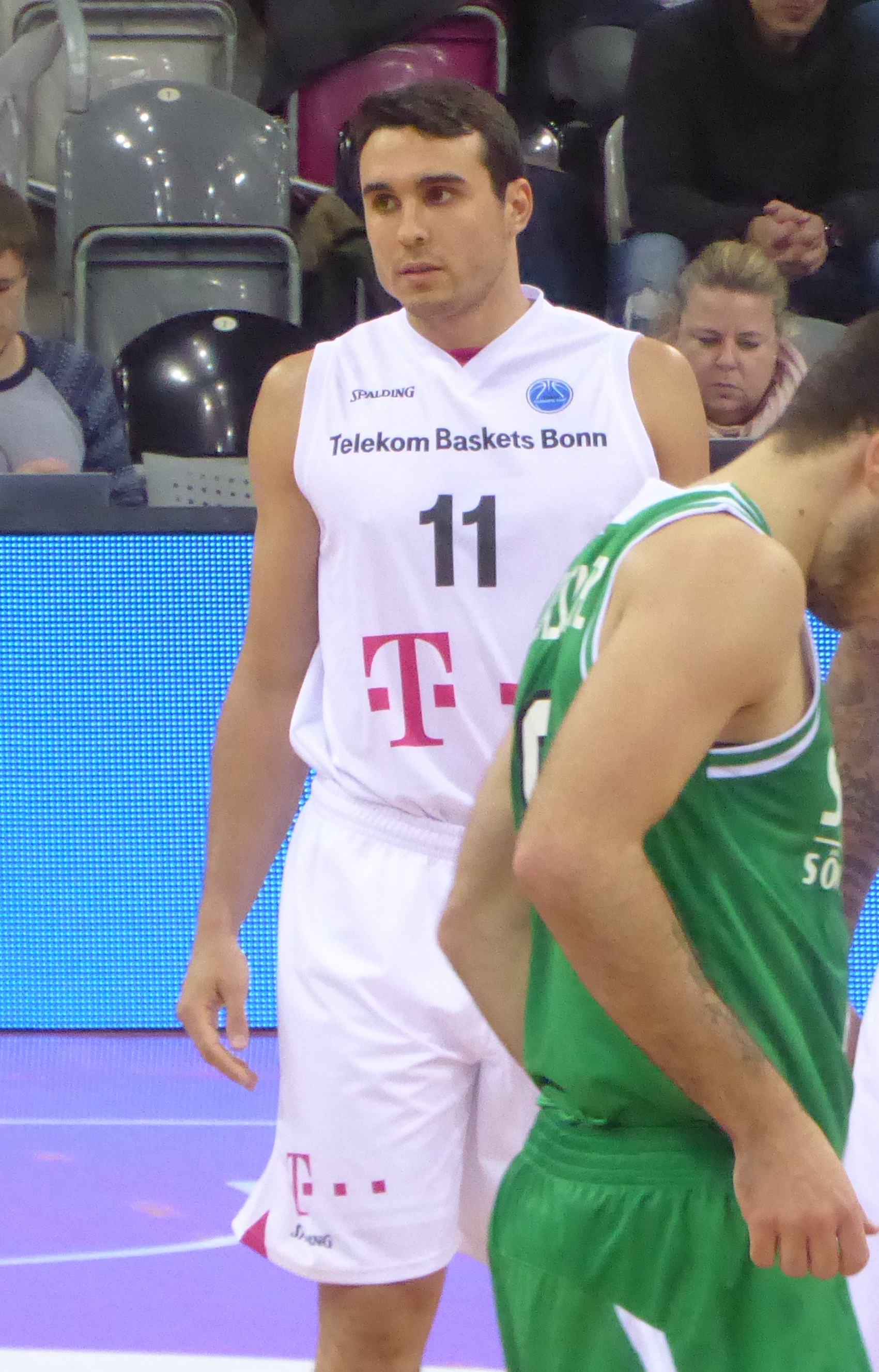 T. J. DiLeo beim Spiel der Telekom Baskets Bonn gegen die Södertälje Kings am 25. Oktober 2016.